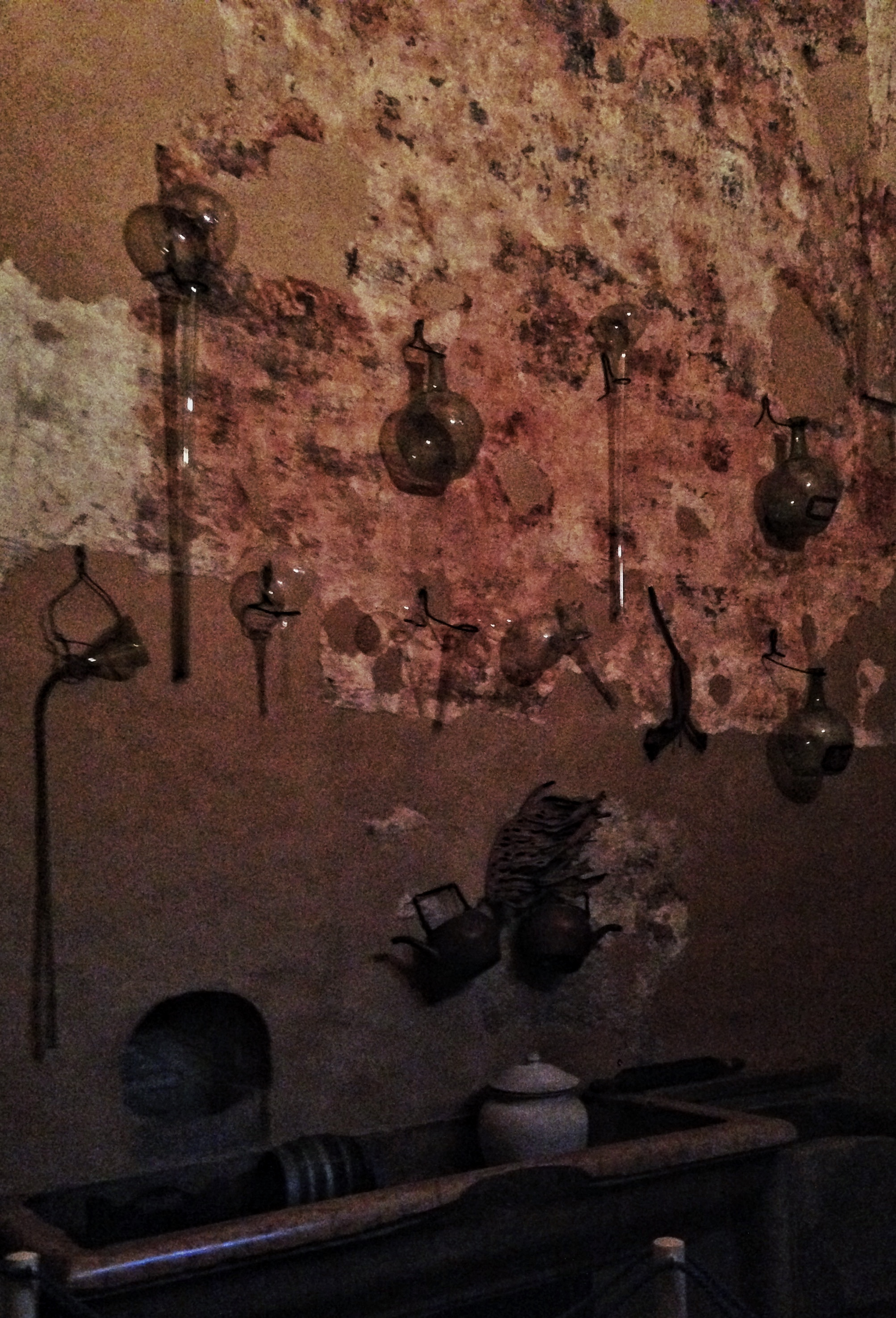 Stanza del pozzo della Antica spezieria